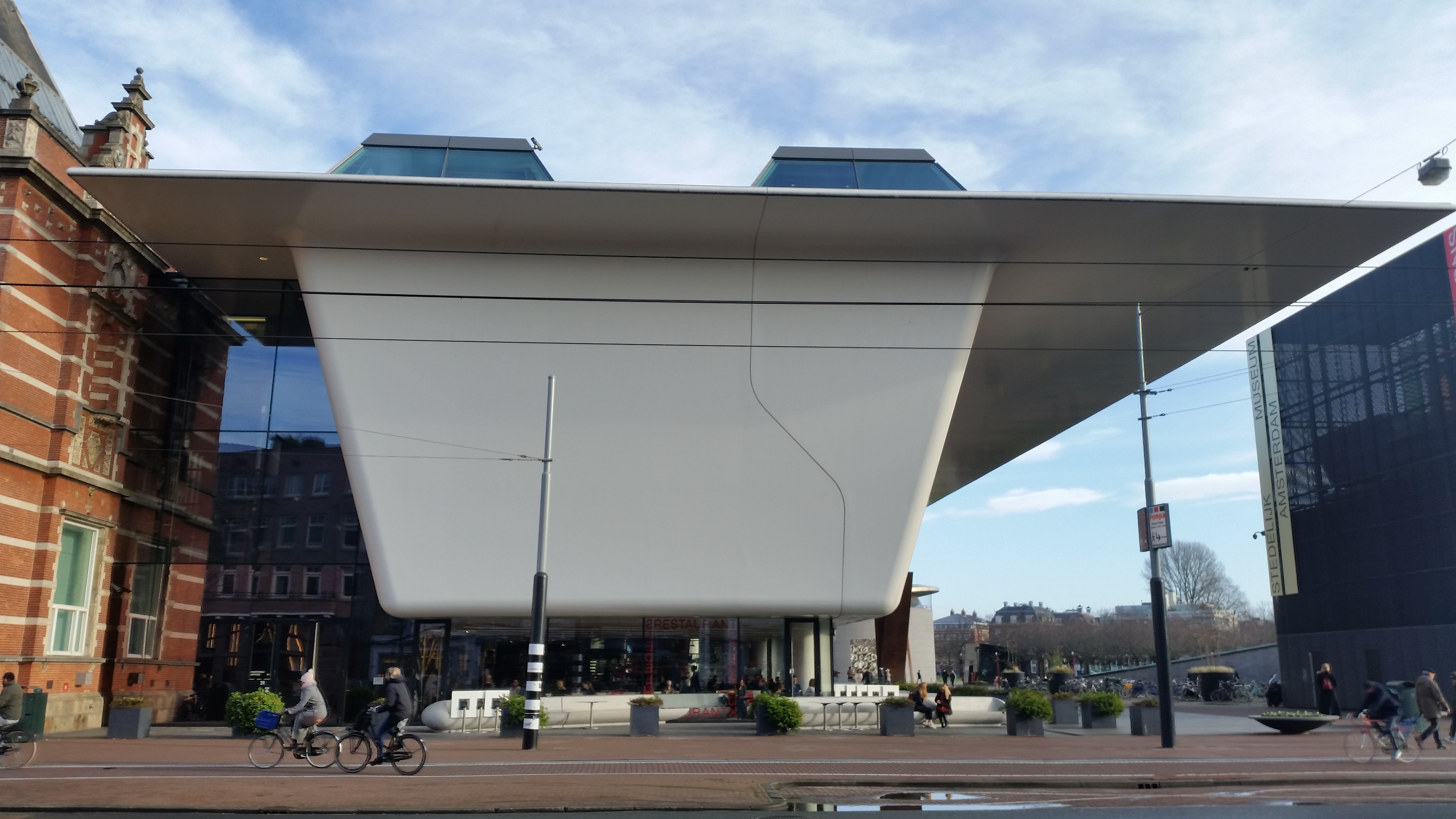 Zicht op een deel van het Stedelijk Museum Amsterdam, ook wel de Badkuip genoemd, gezien vanaf de Van Baerlestraat, Amsterdam